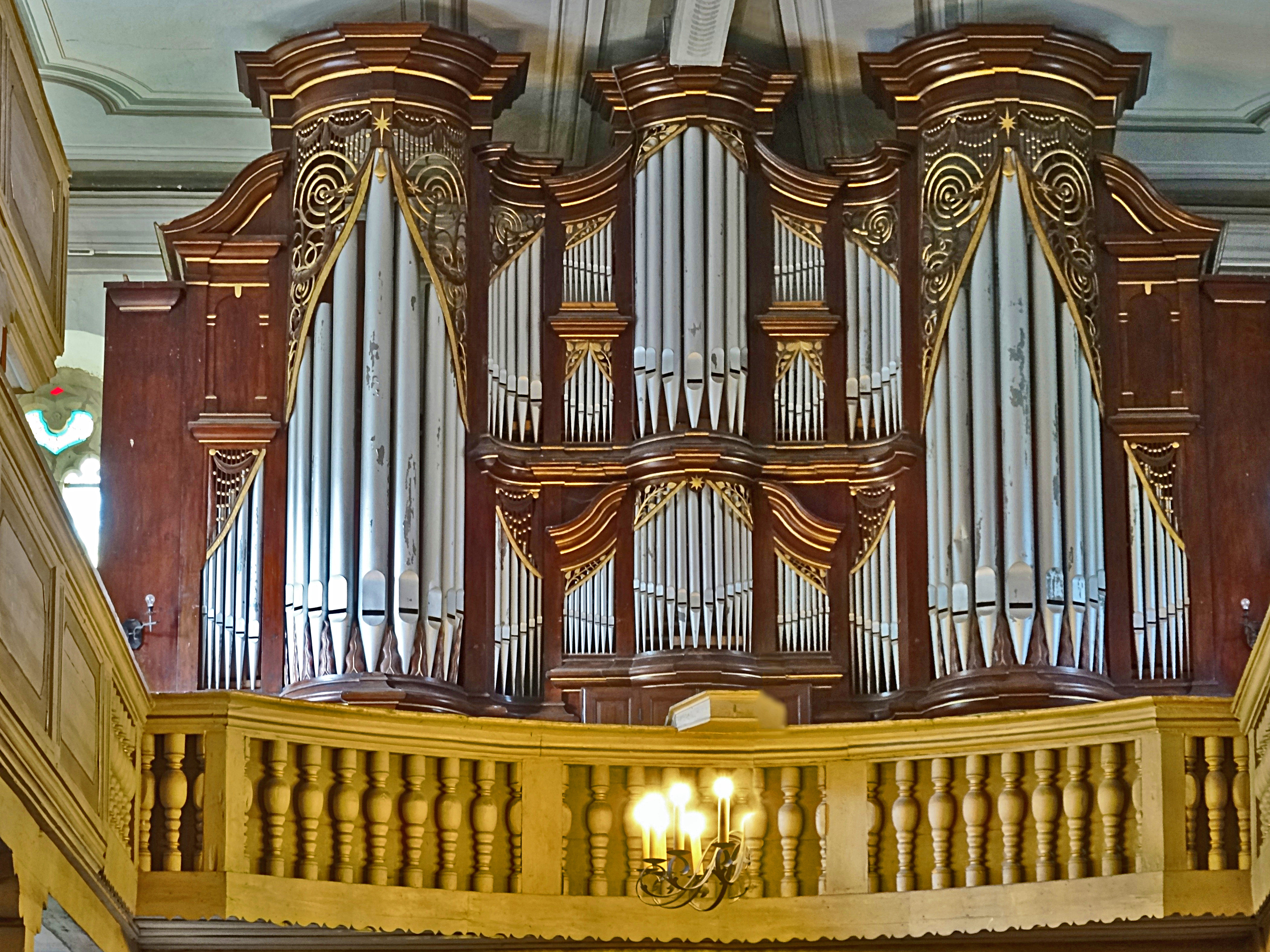 Die Orgel der Kirche St.Vitus in Schloßvippach wurde zwischen 1773-1782 von Johann Friedrich Hartung gebaut, mehrfach umgebaut und 1962 von Gerhard Kirchner restauriert.